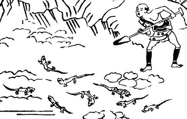 Gecko monster (守宮の妖) from Otogi Bōko (伽婢子)